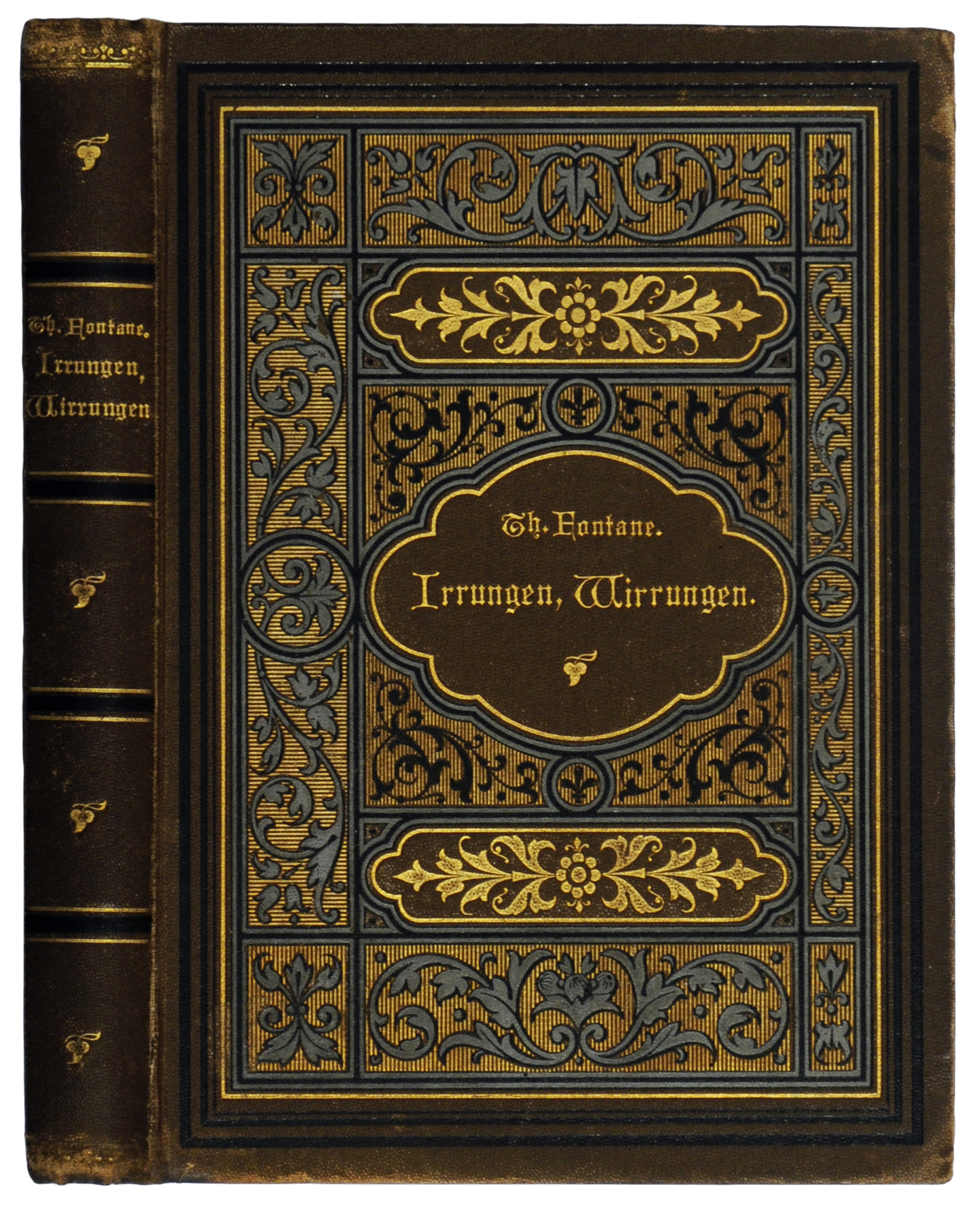 Fontane, Theodor: Irrungen, Wirrungen. Roman (1888). Verlagseinband (Leinen)der ersten Buchausabe.